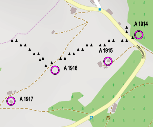 Sperrstelle Heiligenschwendi BE, Schweiz